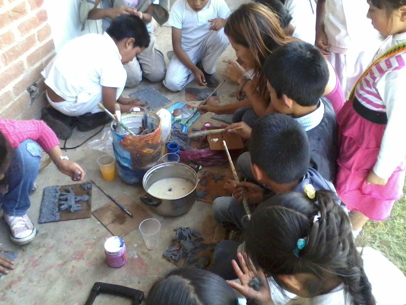 Taller de artes plásticas (elaboración de engrudo incluida) para niñ@s en Ayahualulco, estado de Veracruz, México.